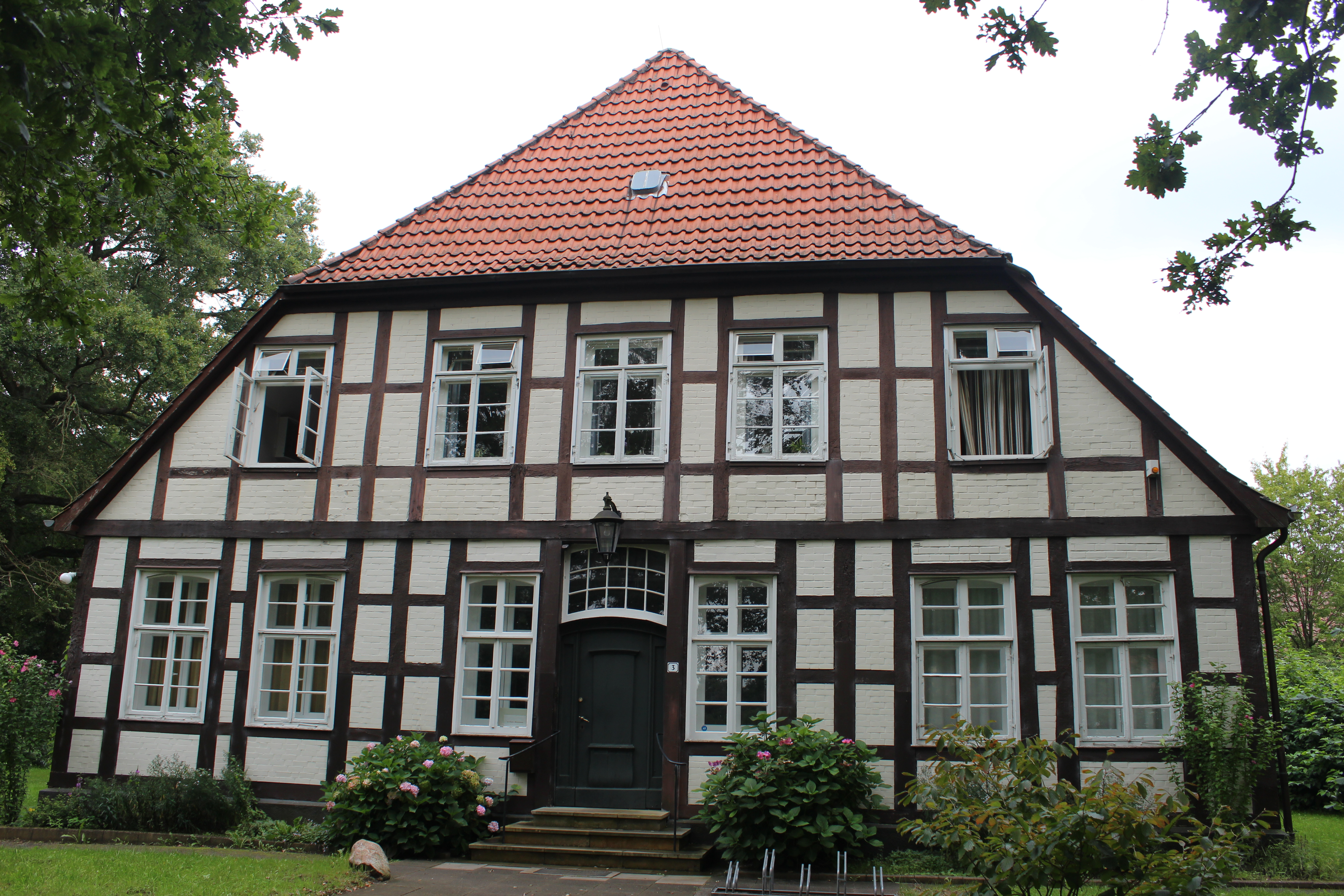 Schloss Schönebeck, Administratorenhaus in Bremen, Im Dorfe 3.Das abgebildete Objekt ist ein geschütztes Kulturdenkmal in der Freien Hansestadt Bremen, mit der Nr. 1284 beim Landesamt für Denkmalpflege registriert.